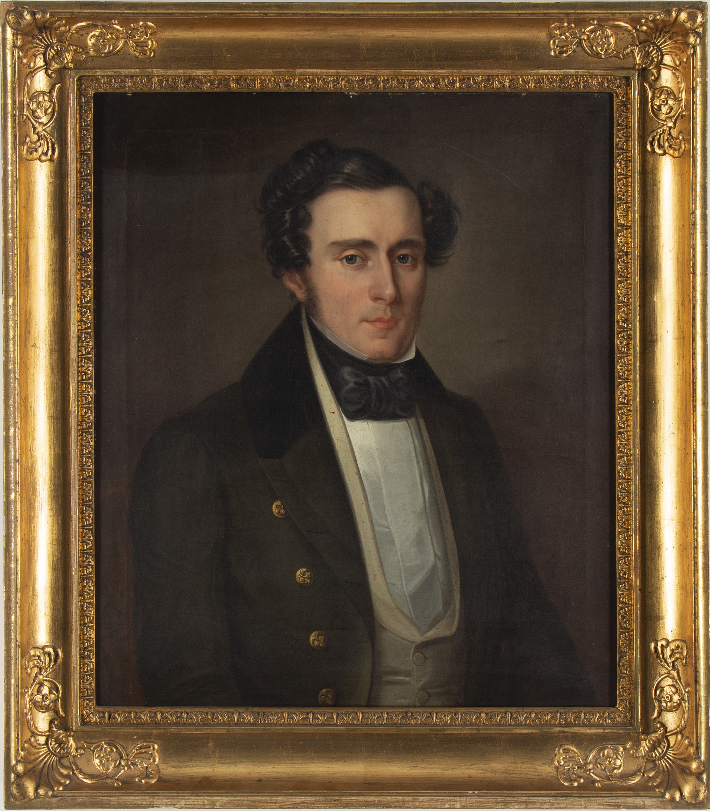 Porträtt av stadskassören i Stockholm Claes Augustin Montelius (1804-1879), avporträtterad under 1830-talet av okänd konstnär.